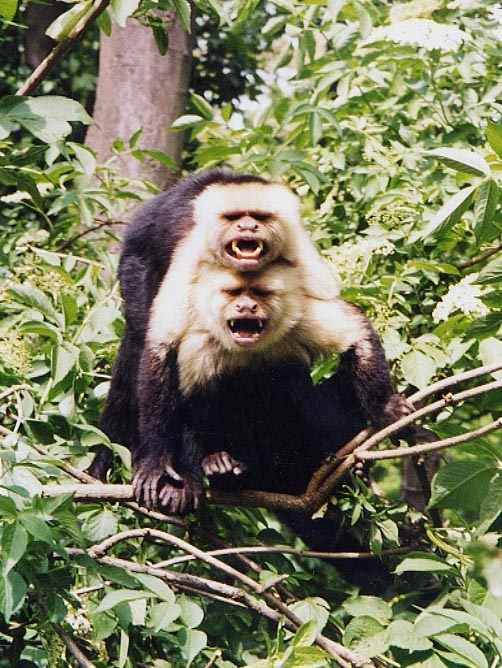 Deux capucins moines Cebus capucinus